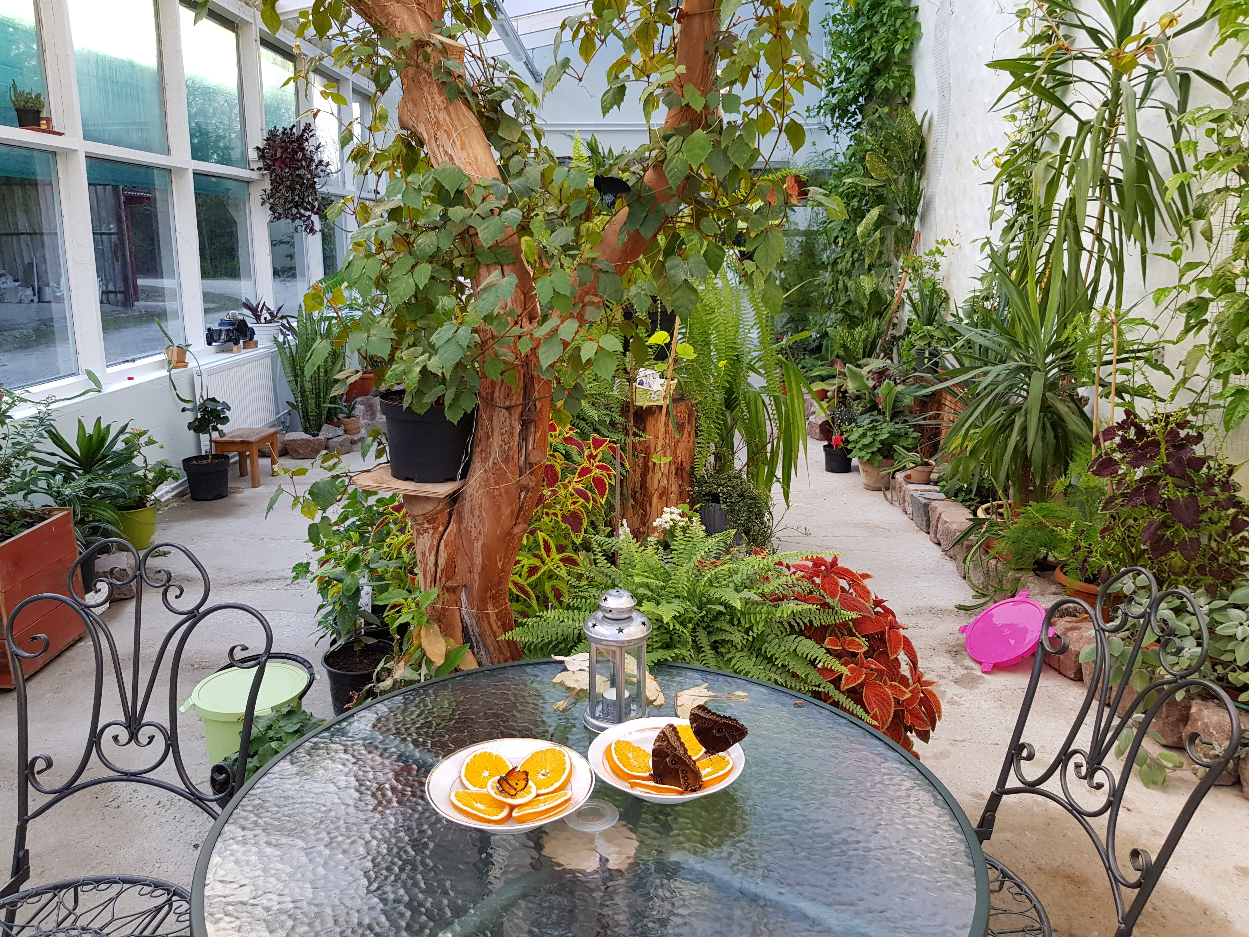 Vaade Liblikamaja sisemusse.